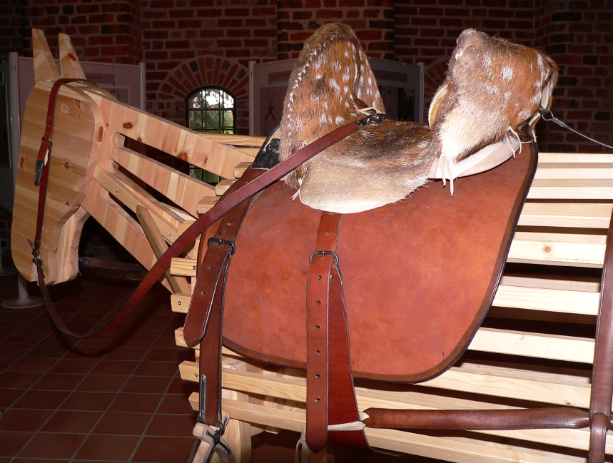 Reitsattel des 8. Jahrhunderts n. Chr. mit Steigbügeln sowie vollständigem Geschirr, Teile gefunden bei der Ausgrabung der Siedlungskammer Rullstorf im Jahre 2000 und als Block geborgen, Foto aufgenommen bei der Ausstellung "Pferd und Sachsen bei den Altsachsen" im Kloster Ebstorf. An der Entdeckung und Restaurierung beteiligt: Ausgrabung: Wilhelm Gebers, Niedersächsisches Landesamt für Denkmalpflege (NLD) Blockbergung und Freilegung: Rolf Wienert, NLD Röntgenuntersuchungen: H. Bauer, Materialprüfanstalt Hannover Restaurierung: Christiane Matz, NLD Holzbestimmungen: H. Eckstein Institut für Forst- und Holzwirtschaft Hamburg, Leder- und Fellbestimmungen: Jutta Gopfrich, Deutsches Ledermuseum Offenbach Fotos: Christa S. Fuchs, NLD Sattelbeschläge: Hermann Suhrke, Boltersen Sattelbau, Beschläge, Riemenverbindungen: Sattlermeisterin Caroli Holeber, Nürnberg Zeichnungen, Bildbearbeitung, Grafik: Agata Michalak, Vijay Diaz, NLD Geländemodell: Egon Brügge, Reppenstedt